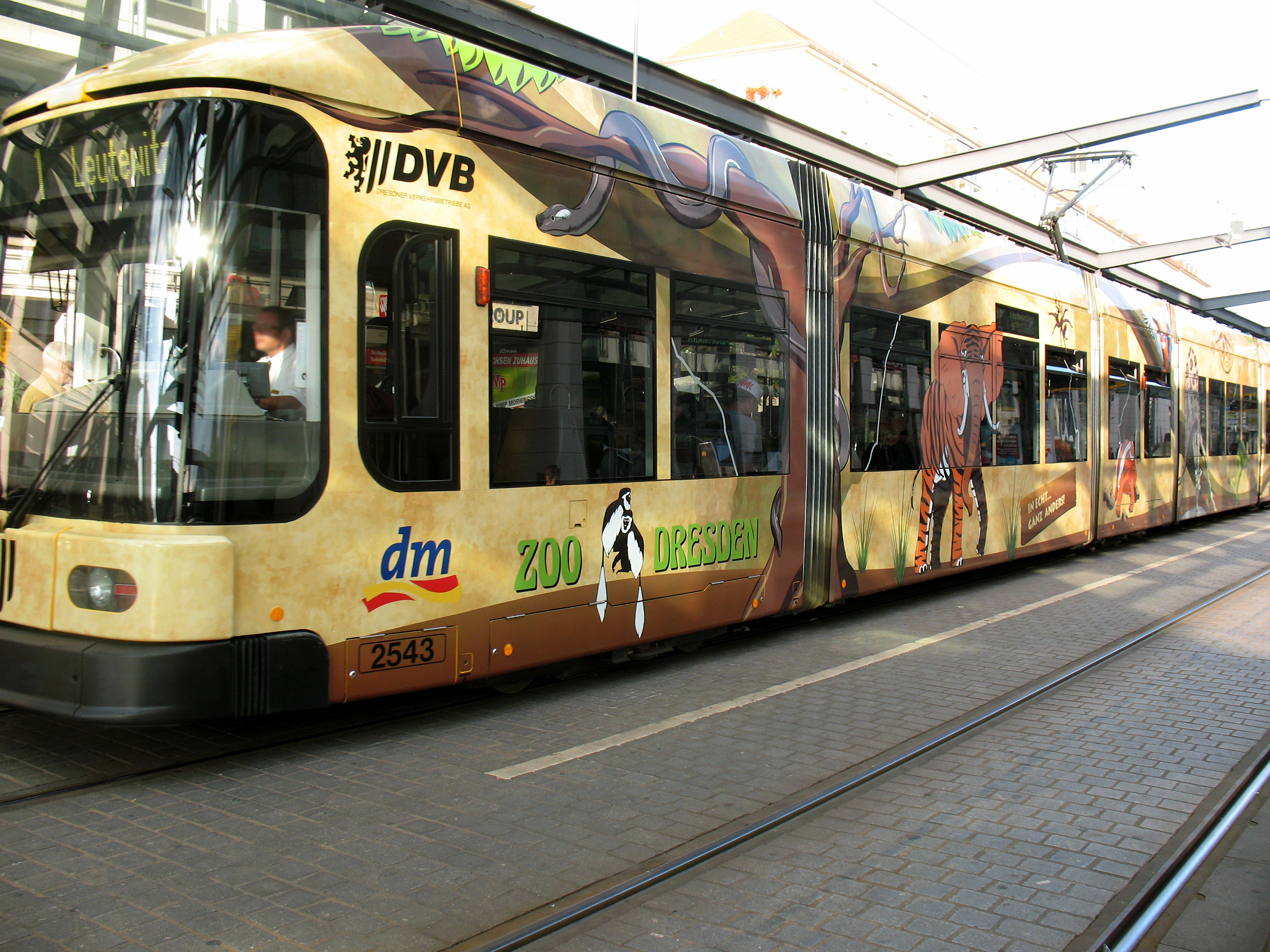 + 00000000023_Image_Postplatz_Dresden_Germany